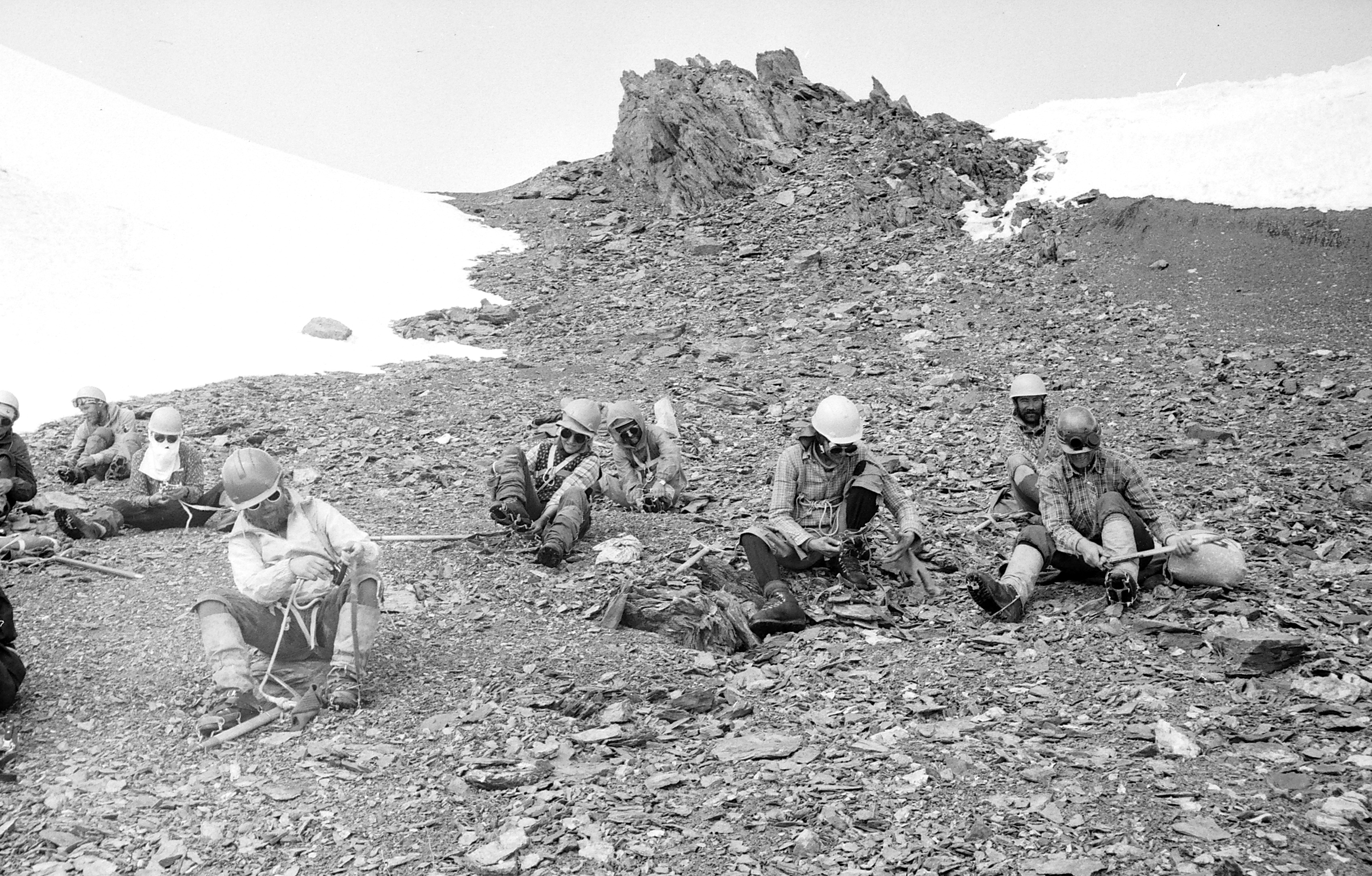 Ekspeditsioon mäetipule "Tartu Ülikool 350".